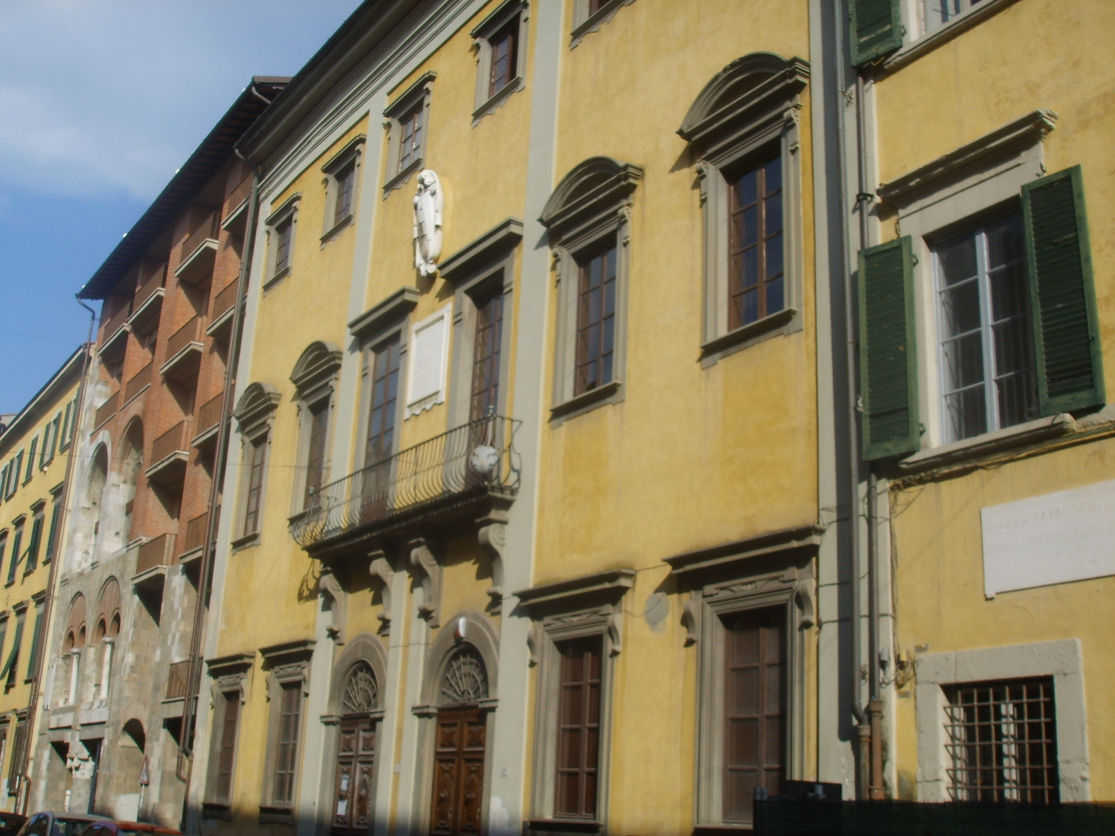 Domus Galileiana